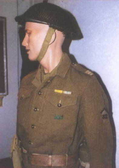 Capitaine du 32° RI sous tenue anglaise à la Libération, selon une reconstitution au Musée du Grand Blockhaus de Batz-sur-mer, illustant l'histoire de la poche de Saint-Nazaire